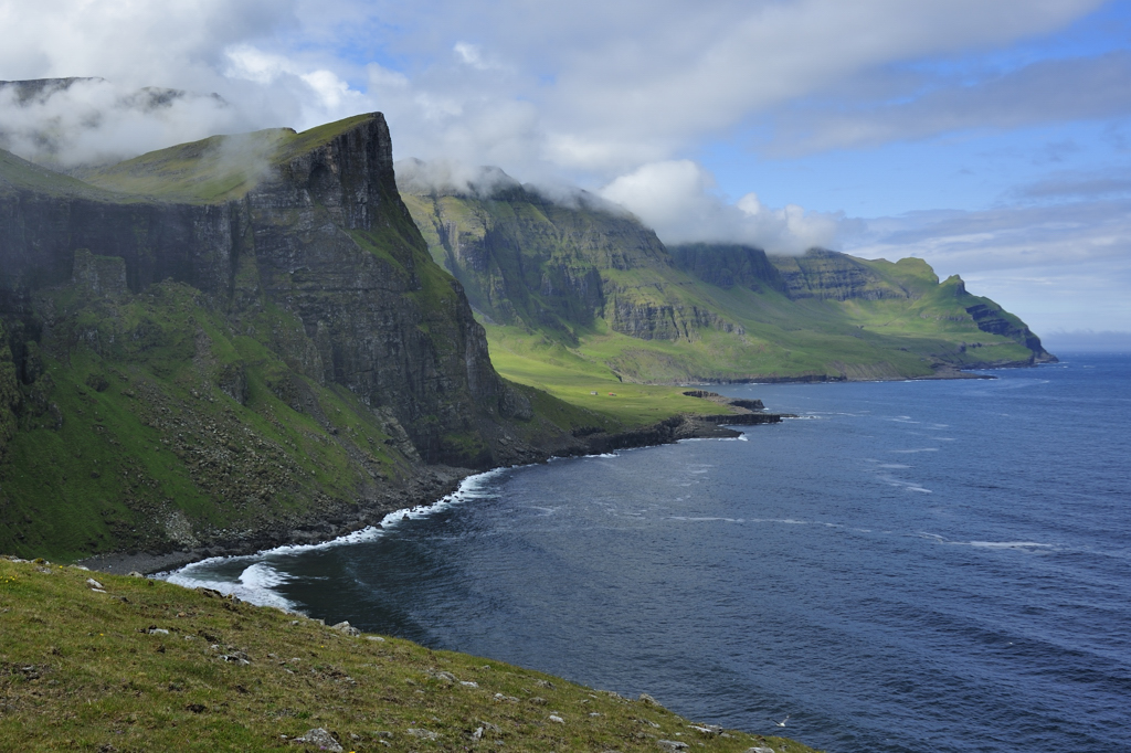 Blick von Viðvík auf den Nordwesten von Vágar, insbesondere auf den 1833 gegründeten, aber wegen seiner Unzugänglichkeit schon 1914 verlassenen Ort Víkar.